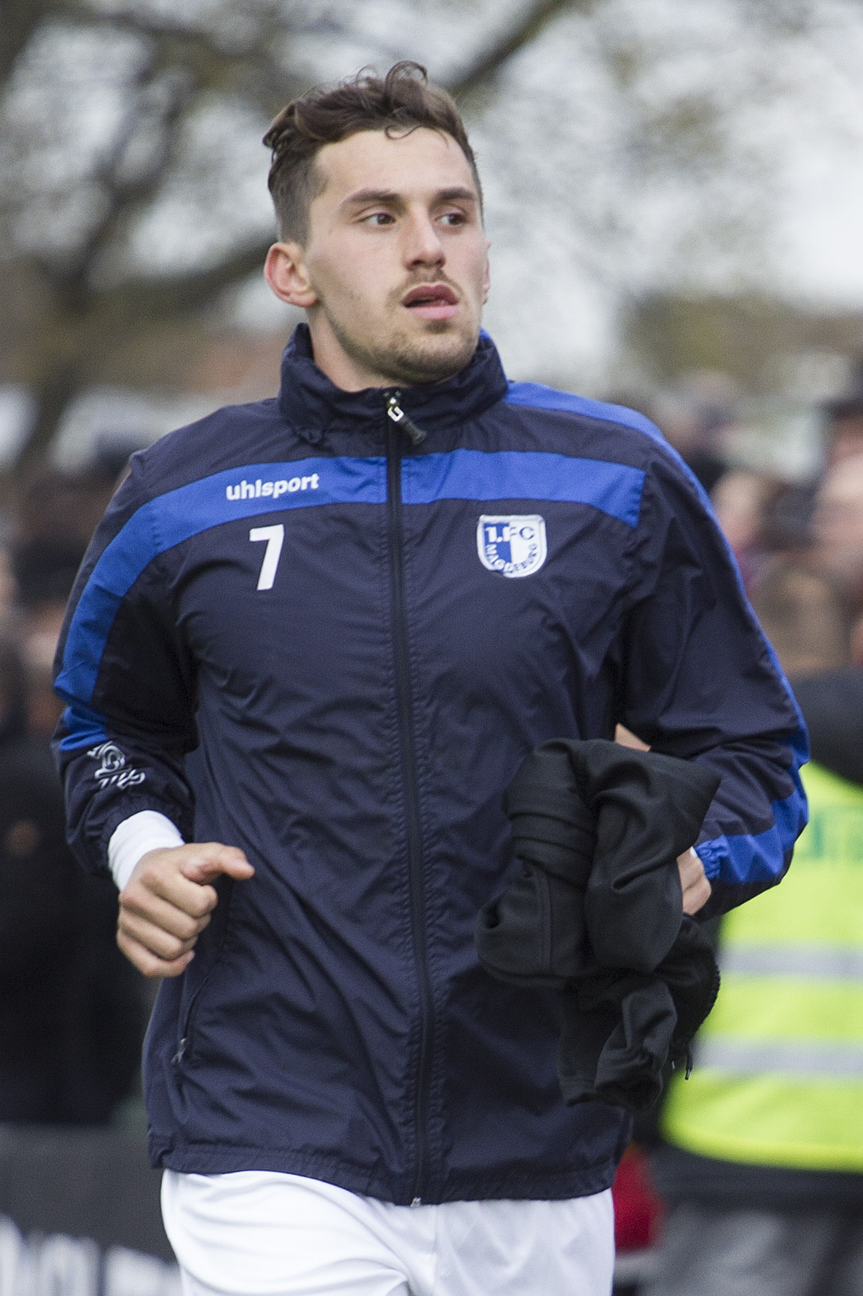 Burak Altıparmak